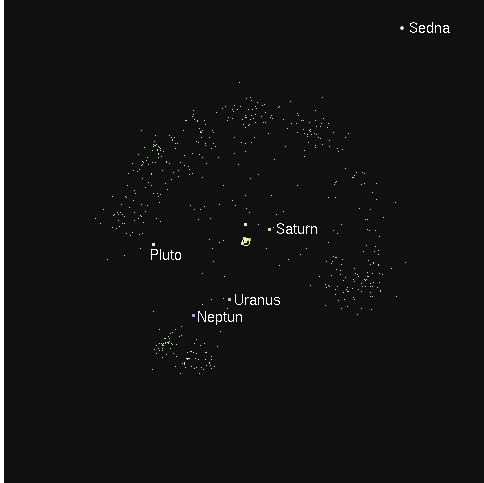 Sednas ungefähre Position relativ zum Kuiperbelt